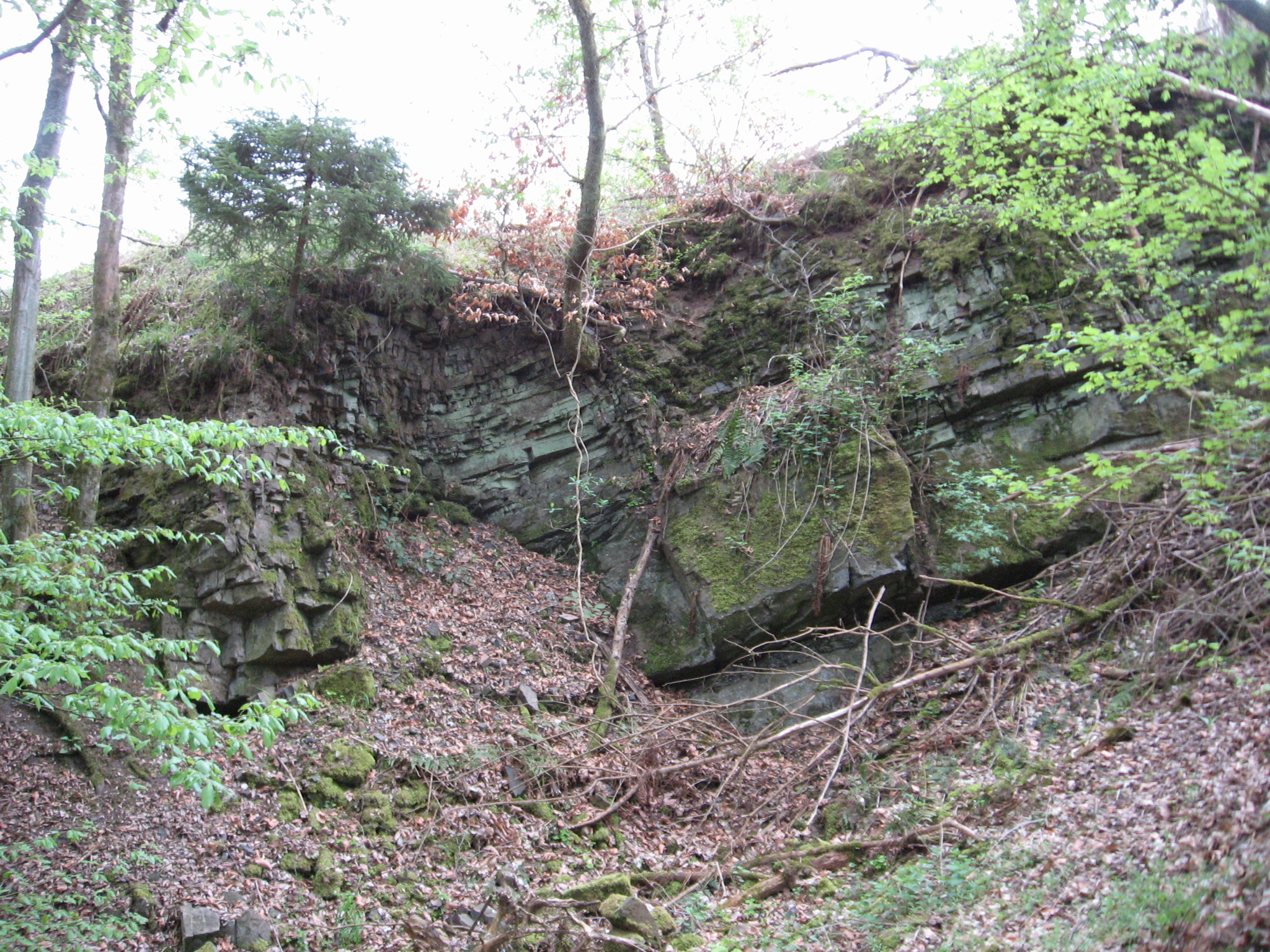 Teilansicht des Naturdenkmal Höveler Knapp südlich von Sundern-Hövel im Hochsauerland, NRW.